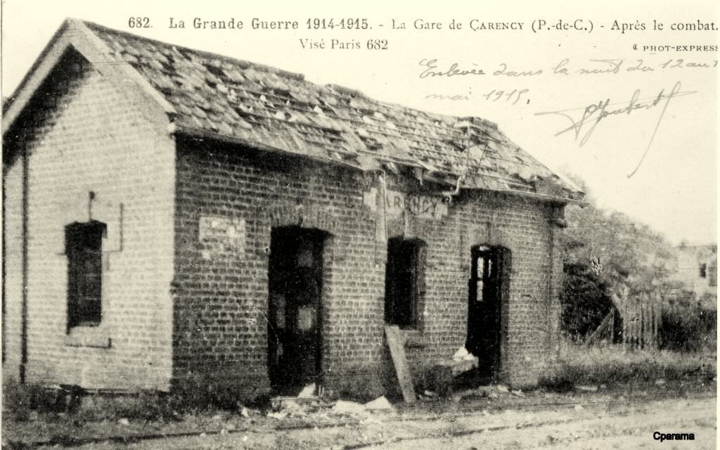 Carte postale Titre : 682. Ka Grande Guerre 1914-1915. - La Gare de Carency (P.-de-C.) - Après le combat. Description : L'aubette de la station de Carency.